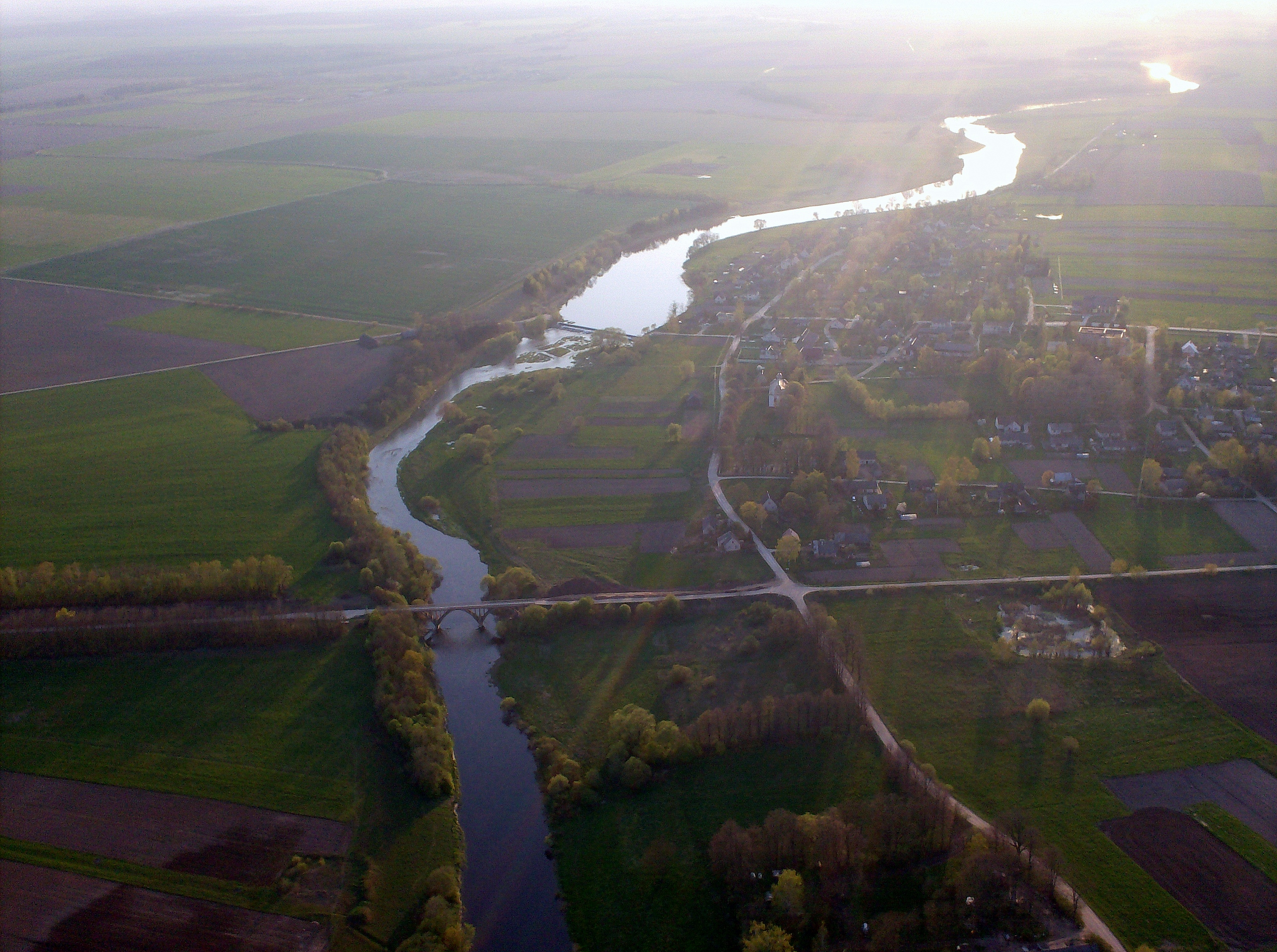 Švobiškis ir Mūšos upė, Pasvalio raj.